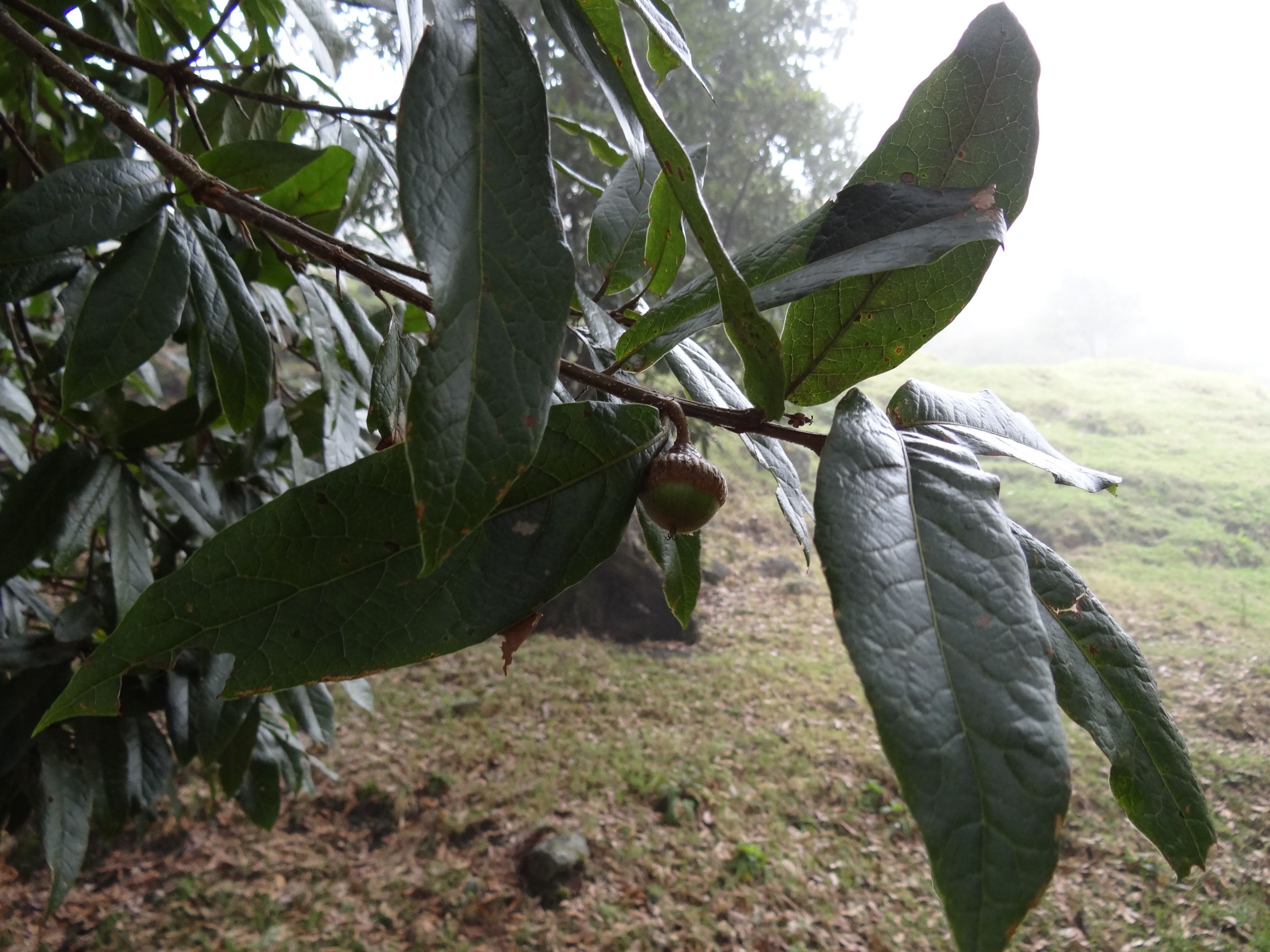 Hojas y fruto del roble colombiano (Quercus humboldtii) en Boyacá, Colombia